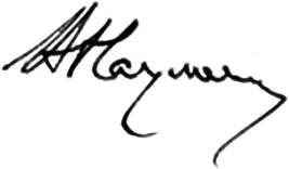 Роспись украинского общественного и политического деятеля Владимира Науменко (1852–1919)